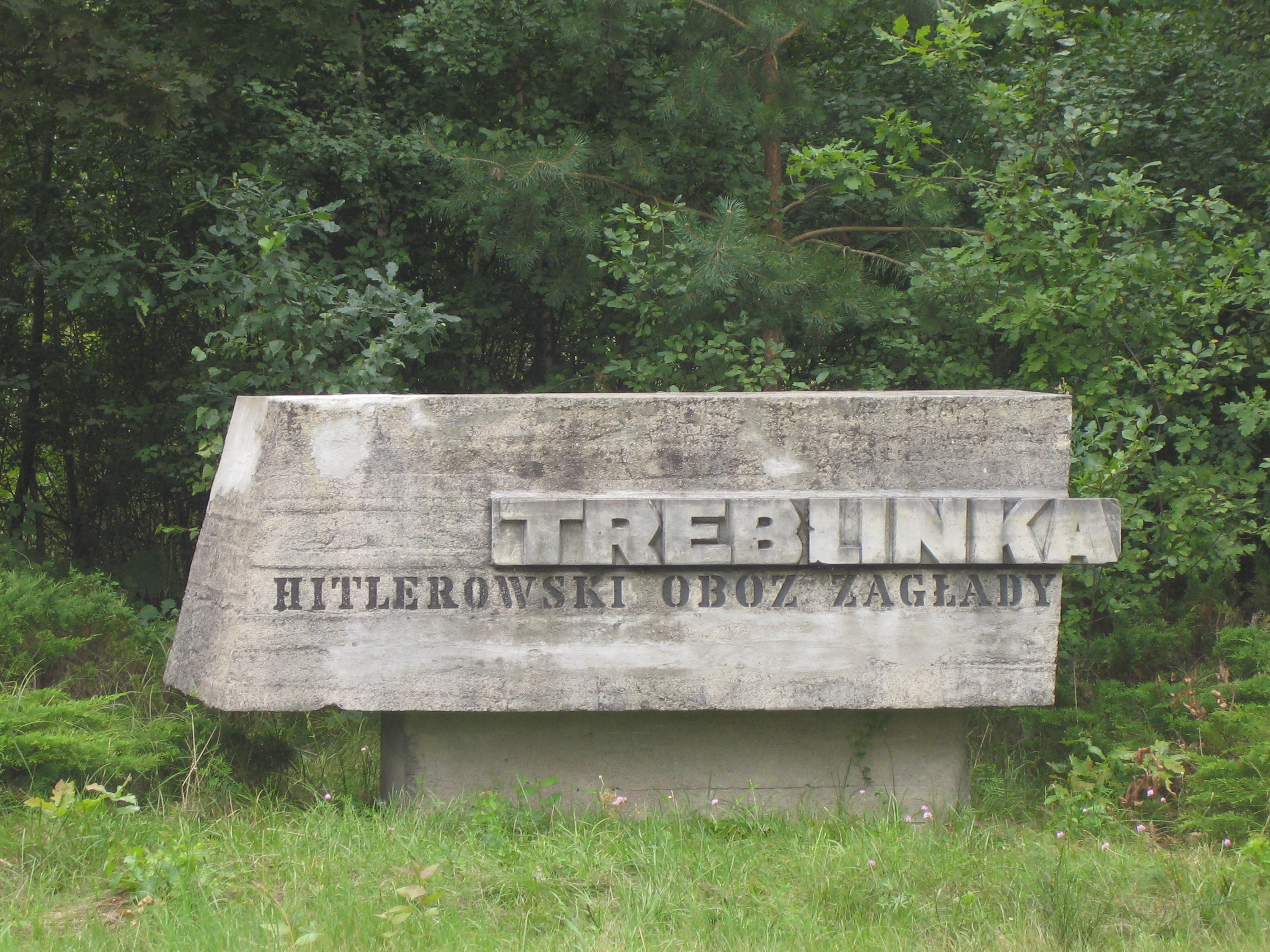 Treblinka